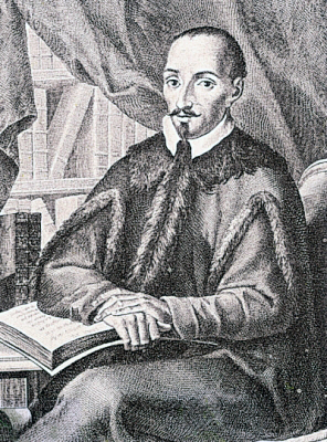 Retrato de Jerónimo Zurita (1512-1580). Iconografía Hispana 10058-1